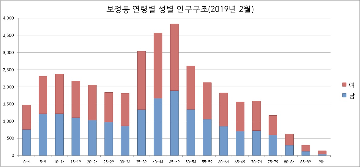 보정동 인구 구조를 나타낸 그래프